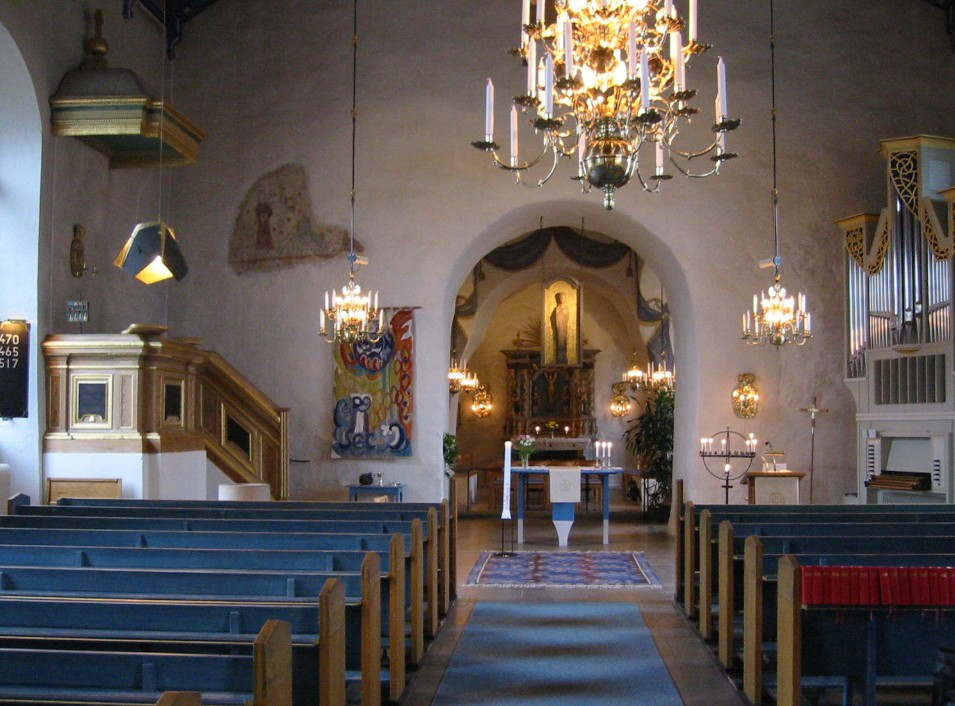 Ödeshög kyrka.Interiör.